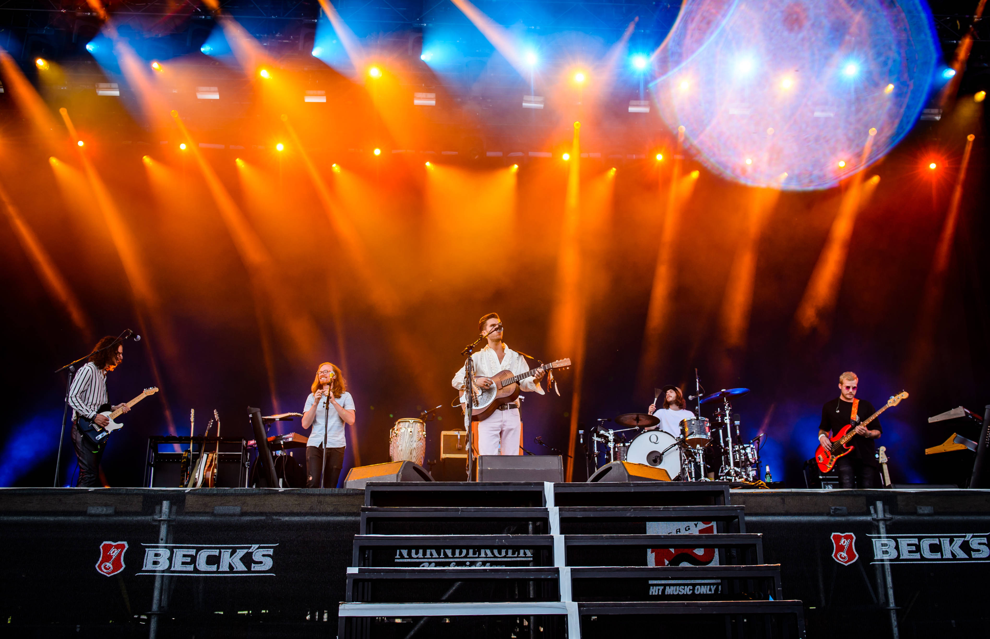 'Rock im Park 2018; Zeppelinfeld Nürnberg': 'Kaleo'